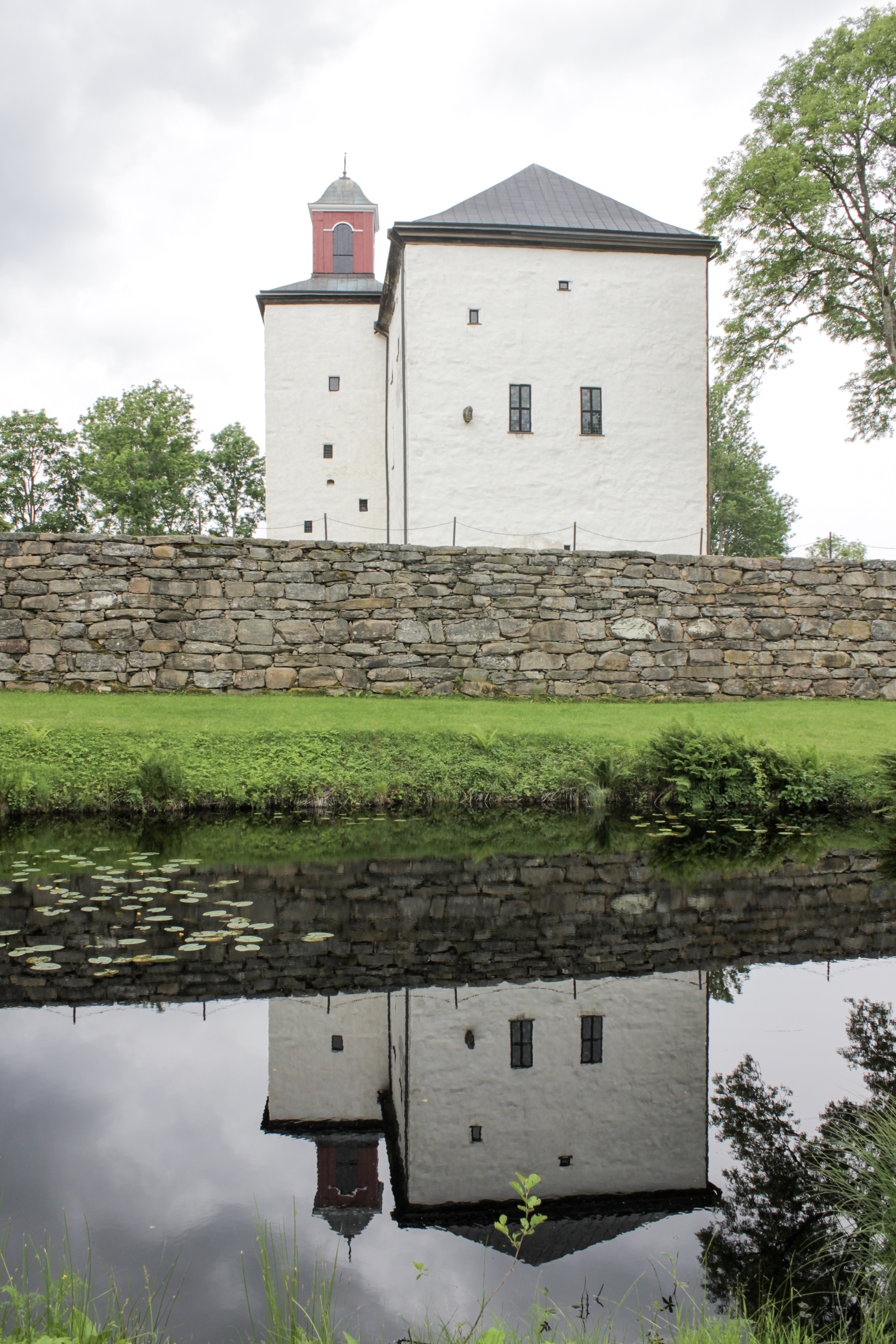 Torpa stenhus, Västergötland.